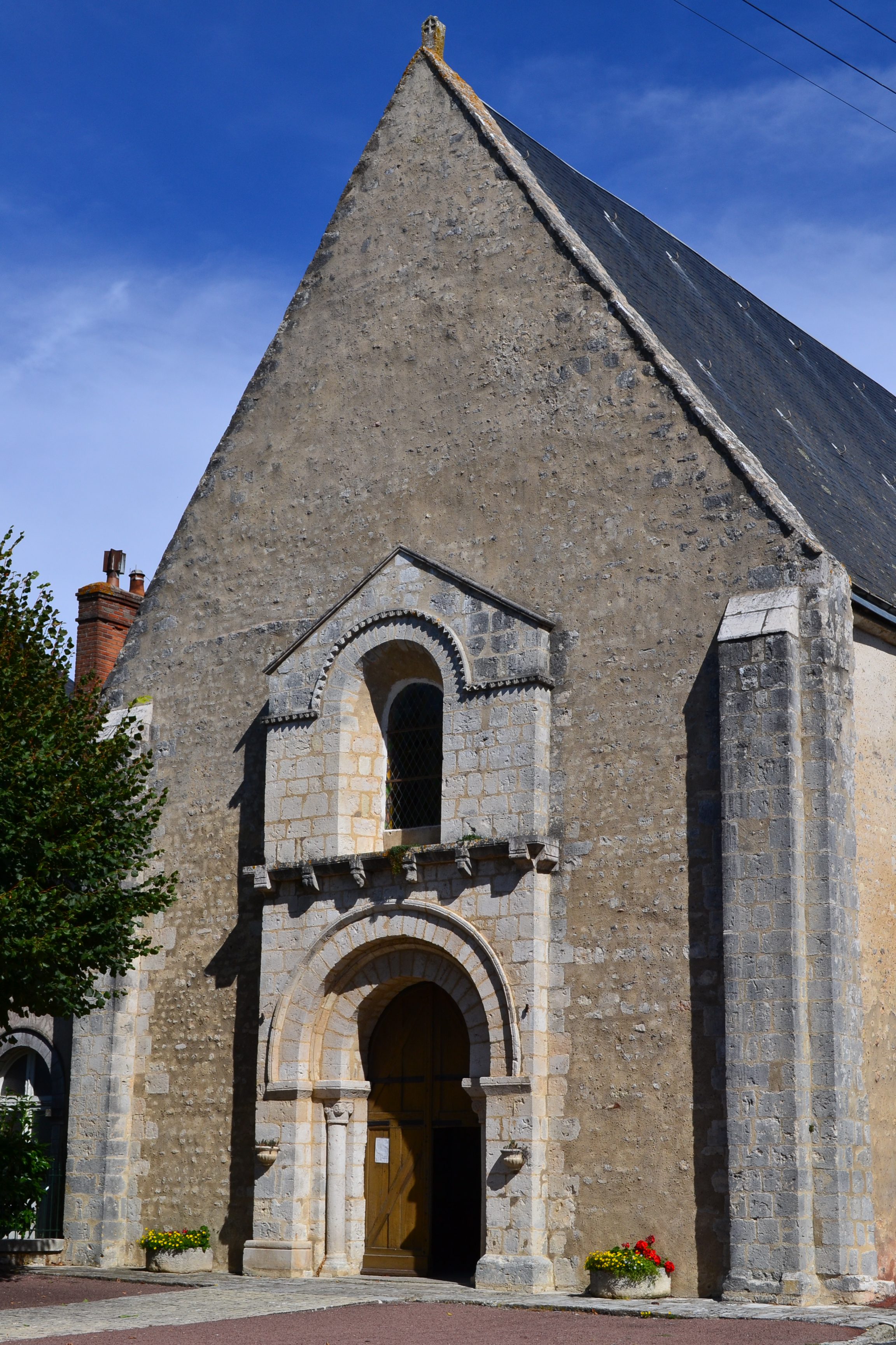 11e siècle ; 12e siècle La construction de l'église paraît remonter au 12e siècle, avec des modifications postérieures. Cette église comprend une nef et un choeur, non voûtés, avec entraits sculptés à leurs extrémités (têtes d'animaux, feuillages, personnages) et aiguilles apparents. Le portail ouest présente des caractéristiques du 12e siècle : colonnes sur bases avec chapiteaux ornés de feuillages, arc en plein cintre surmonté d'un second arc avec cordon chanfreiné. Sur le côté nord du choeur s'élève la tour du clocher, de plan carré. La salle basse du clocher communiquait autrefois avec le choeur et était voûtée en coupole, sur pendentifs, et décorée de peintures. A la suite d'une catastrophe, la voûte s'est effondrée. Un pan de bois fut ensuite monté vers le milieu pour porter une nouvelle charpente et le beffroi. Le reste a été utilisé comme sacristie. Le mur oriental avec pignon présente un décor de petits moëllons ayant différentes dispositions d'appareillage. A la partie inférieure, les moëllons sont disposés horizontalement. Au-dessus, ils sont disposés en "opus spicatum". Puis, ils sont carrés et posés sur l'angle. Ensuite, la décoration devient plus compliquée, formée de petits moëllons carrés entourés d'hexagones allongés. Plus haut, ce sont des petits losanges debout, puis couchés. Au-dessus de ce bandeau, ils prennent une forme triangulaire et sont posés sur la pointe. Losanges debout puis couchés terminent le décor du pignon.